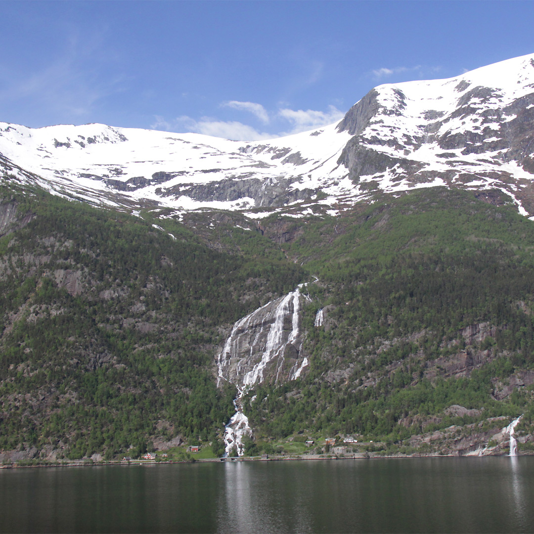 Ædnafossen, Hardanger, Norge.